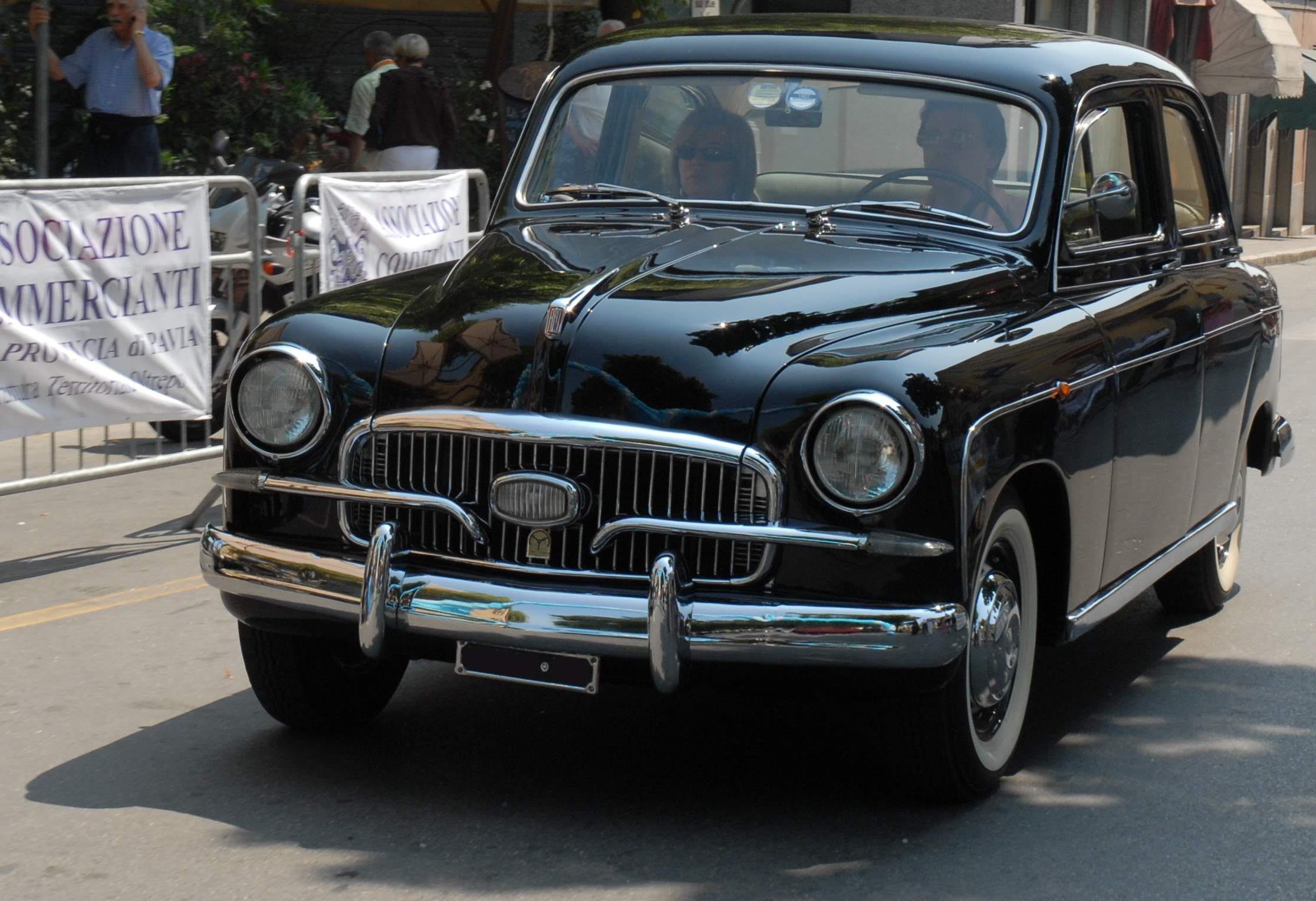 Fiat 1400 B Berlina at 2° Raduno Auto Storiche Città di Stradella (Pavia), 22 June 2008.